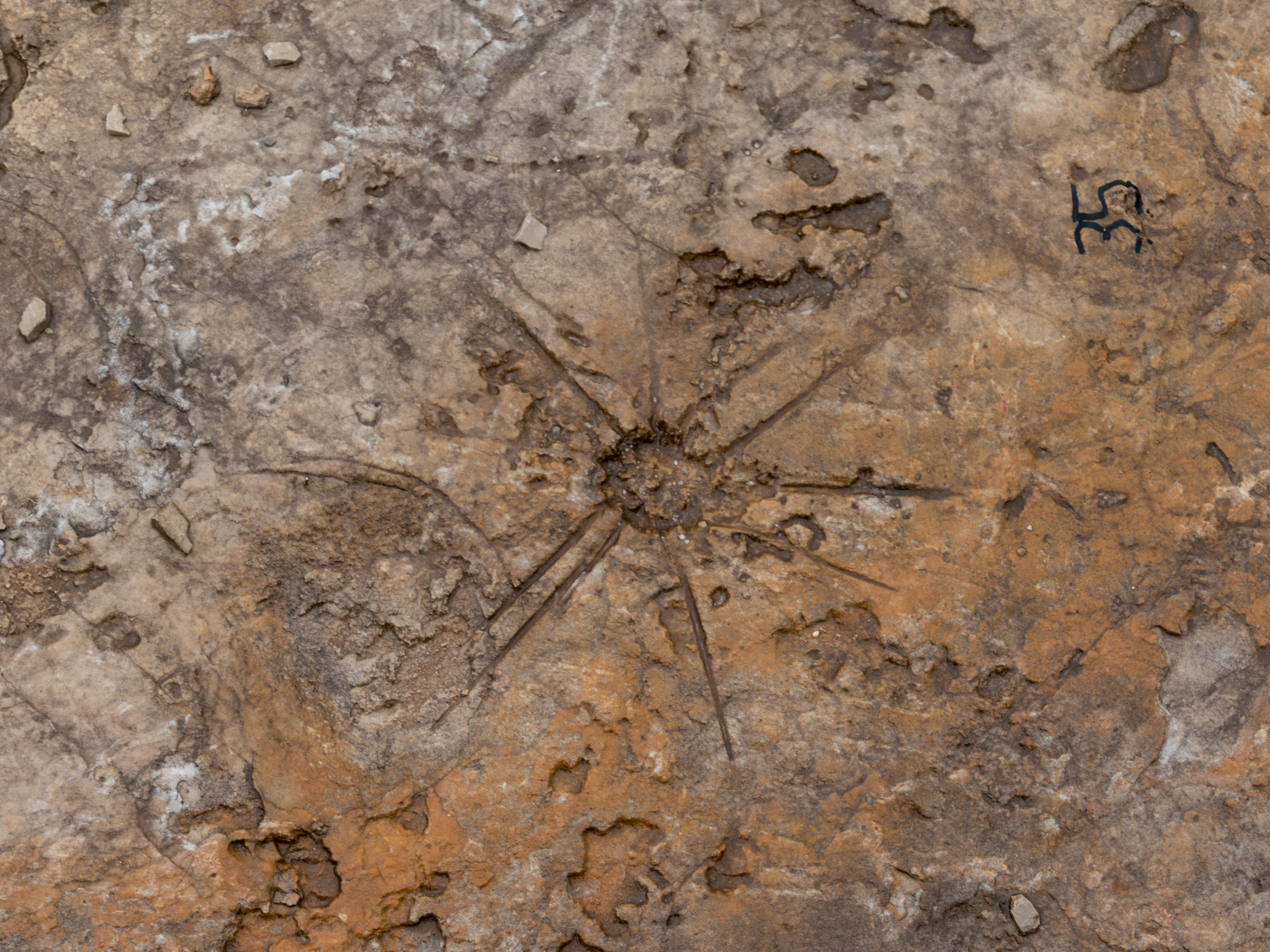 Cabeço da Ladeira This is a photography of a Site of Community Importance in Portugal with the ID: PTCON0015. Natura2000 entry, EEA entry